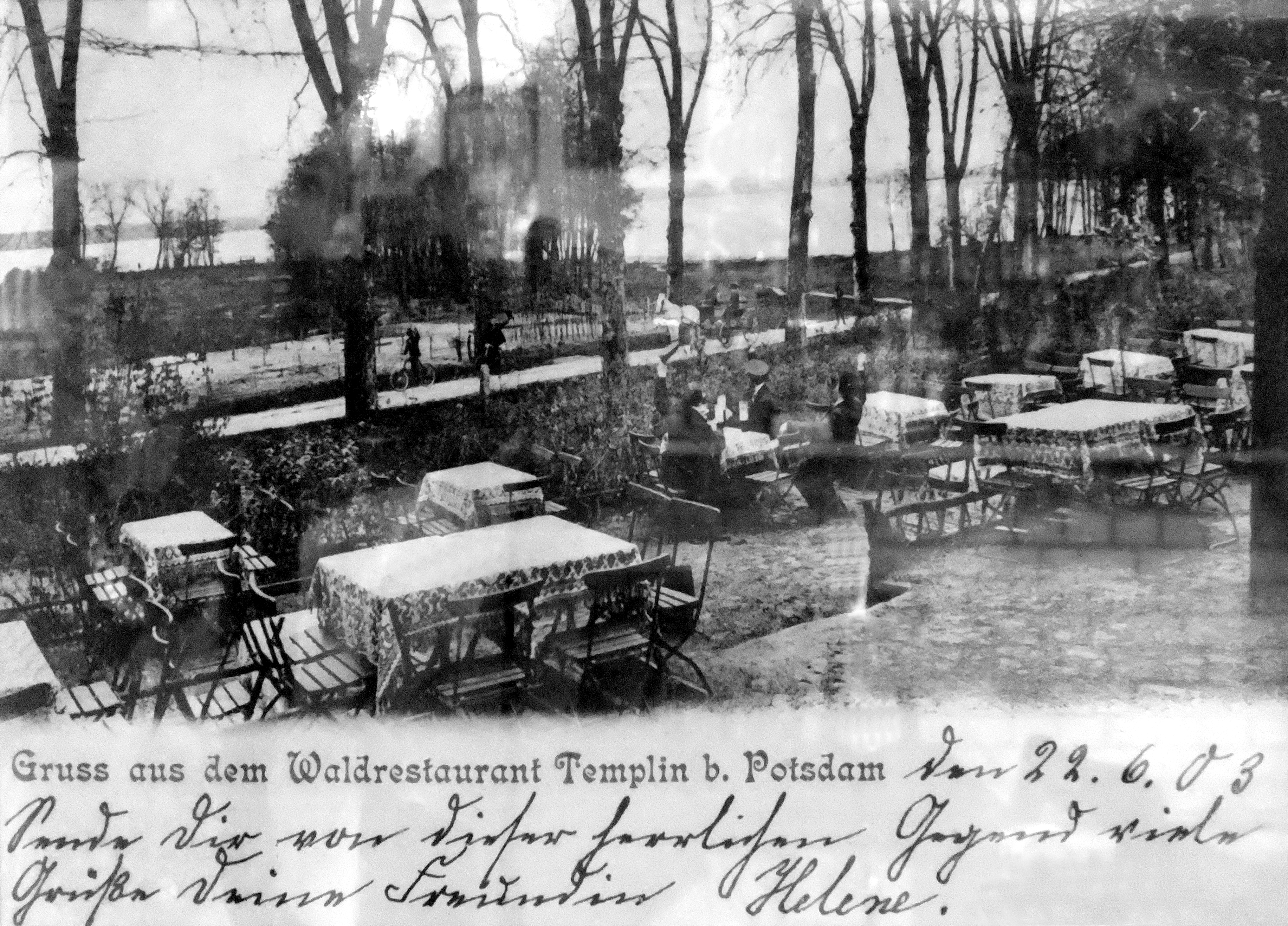 histor. Ansichtskarte der Gaststätte 'Forsthaus Templin’, 1903 geschrieben